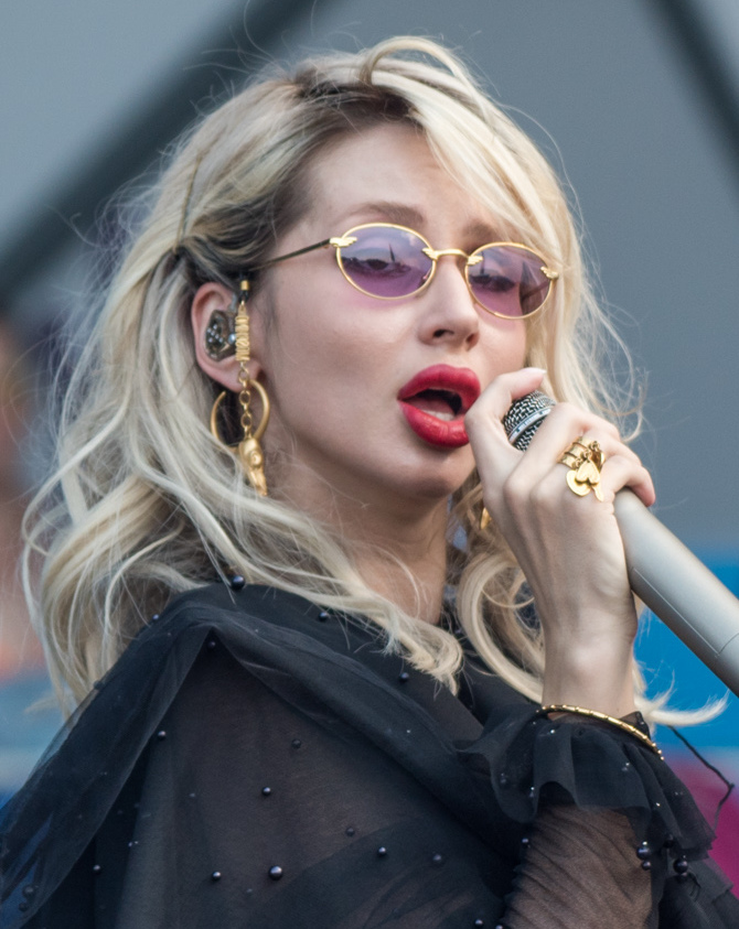 Светлана Лобода на VK Fest 2018